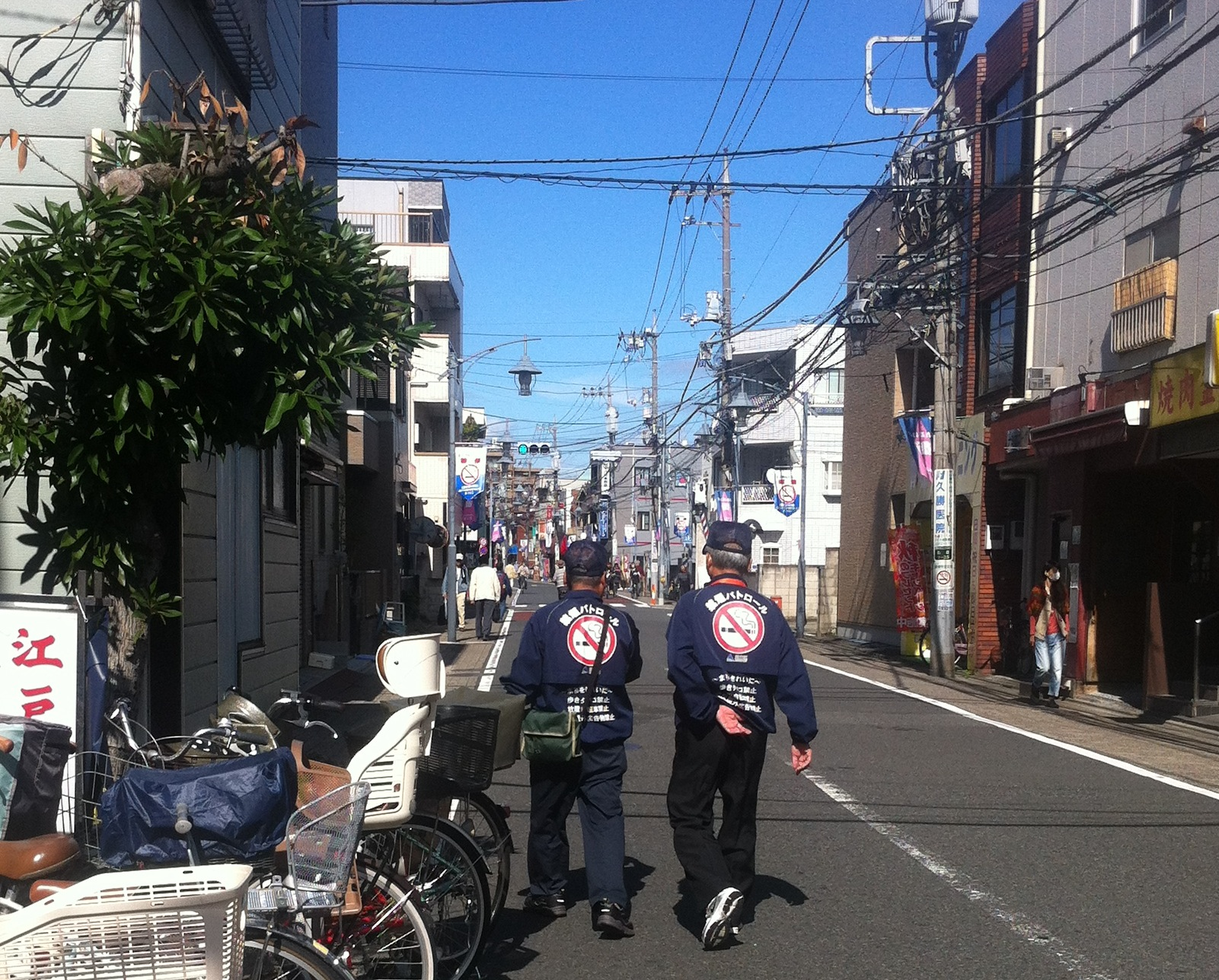 禁煙パトロール (日本) No Smoking patrol (Japan)